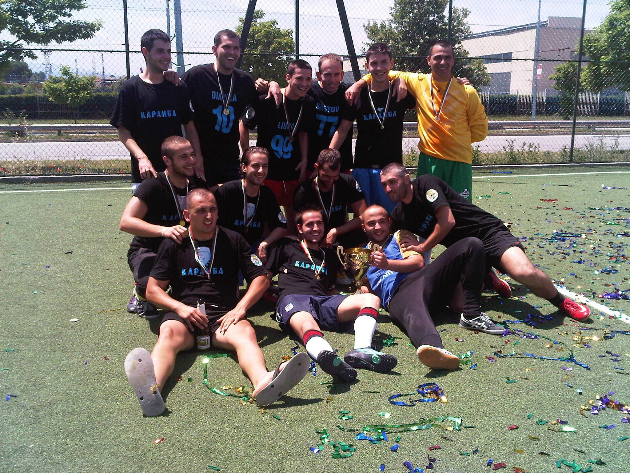 Отборът на Карамба , шампион ППАФЛ 2010/2011 година.